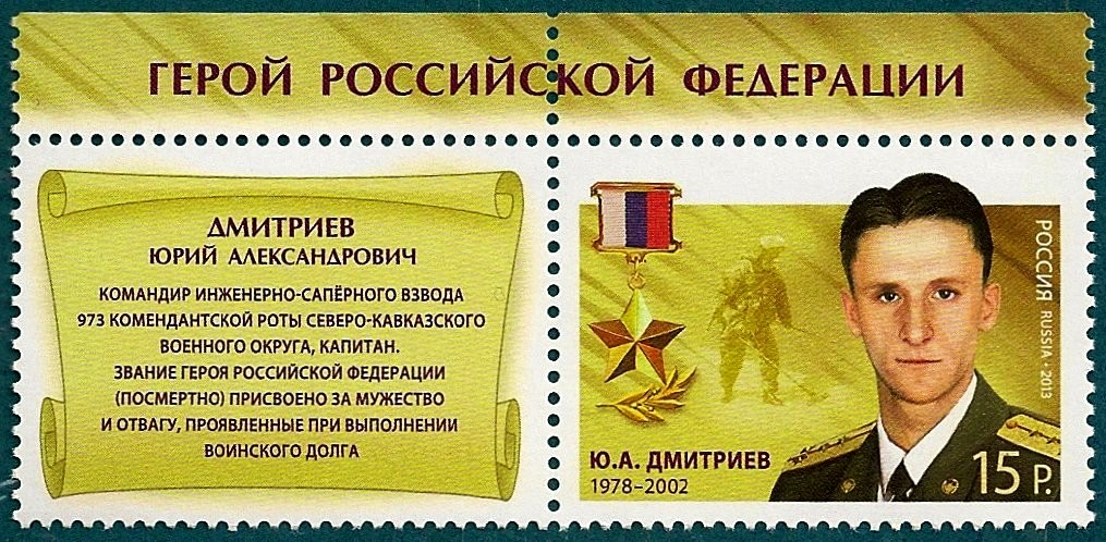 Почтовая марка России 2013 года. Герои РФ. Дмитриев Ю.А.